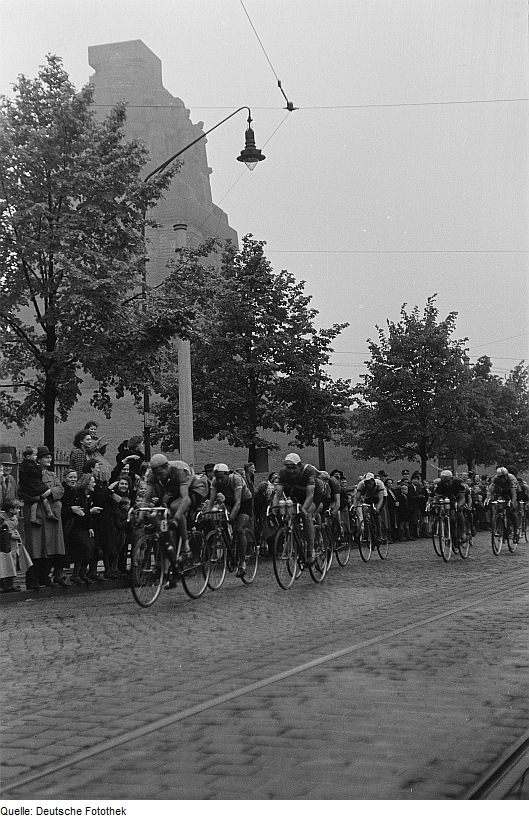 Original image description from the Deutsche FotothekRadrennfahrer in den Straßen der Innenstadt, im Hintergrund das Völkerschlachtdenkmal